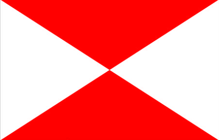 Desenhada por Wellington P F de lima seguindo o modelo, baseando-se na coleção de Carlos Piquet, onde constam quinze bandeiras numeradas de número 36 até 50, com a rubrica “bandeiras das antigas províncias do Império”, no Museu Histórico Nacional.